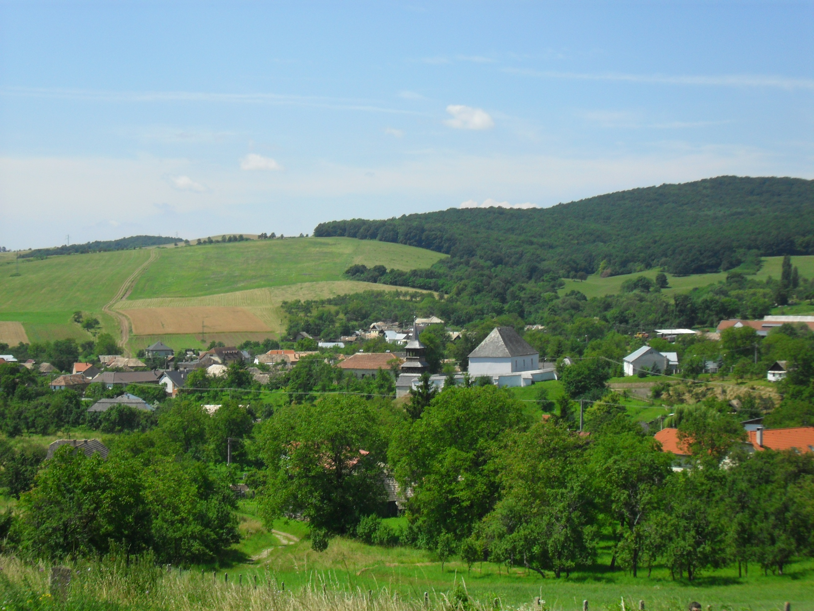 Felsővály - a falu látképe a temetődombról